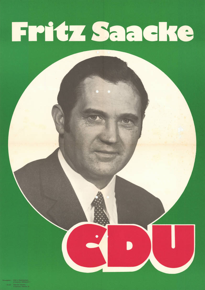 Fritz Saacke CDUAbbildung:PorträtfotoPlakatart:Kandidaten-/Personenplakat mit PorträtAuftraggeber:CDU in Niedersachsen, HannoverDrucker_Druckart_Druckort:Gebrüder Jänecke, HannoverObjekt-Signatur:10-008 : 321Bestand:Landtagswahlplakate Niedersachsen ( 10-008)GliederungBestand10-18:Landtagswahlplakate Niedersachsen (10-008) » CDULizenz:KAS/ACDP 10-008 : 321 CC-BY-SA 3.0 DE